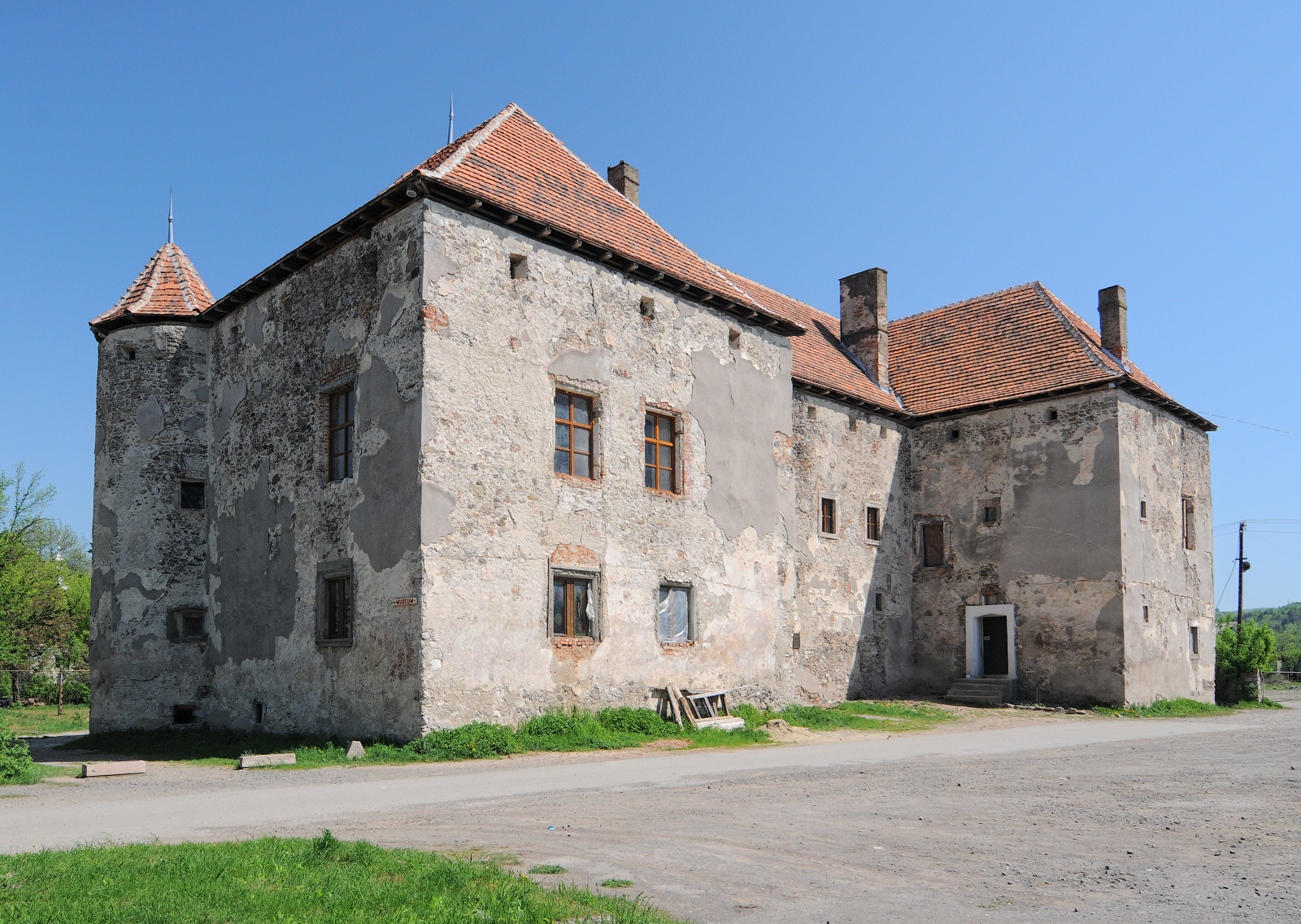 Замок Сент-Міклош в Чинадієвому